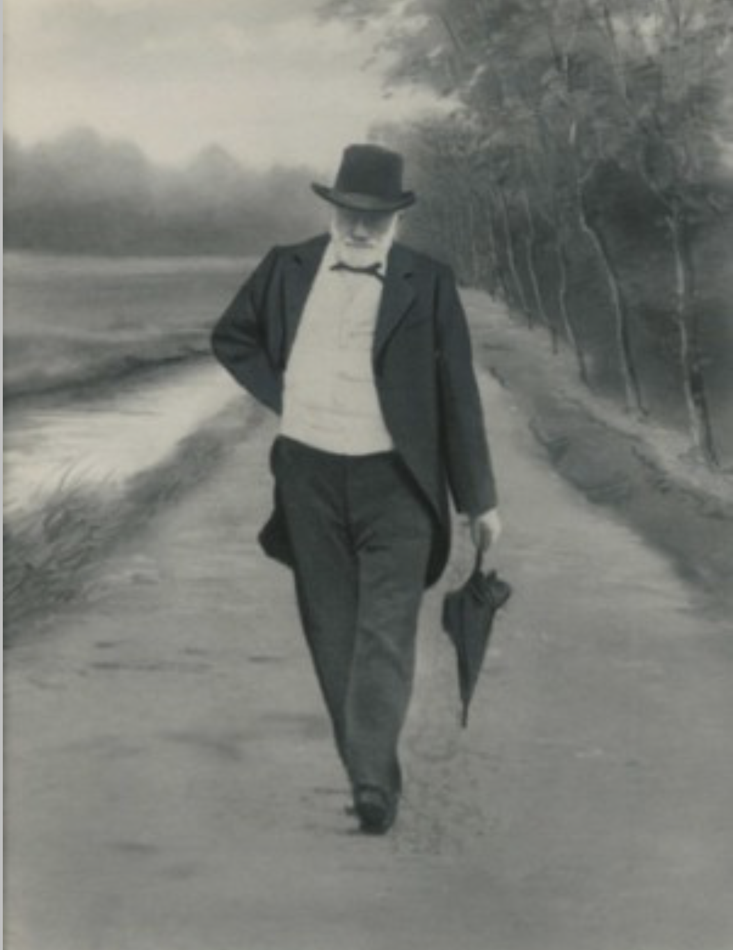 Johannes Pottinga (1831-1922), burgemeester van Diever, Vledder, Zuidwolde en Hoogeveen